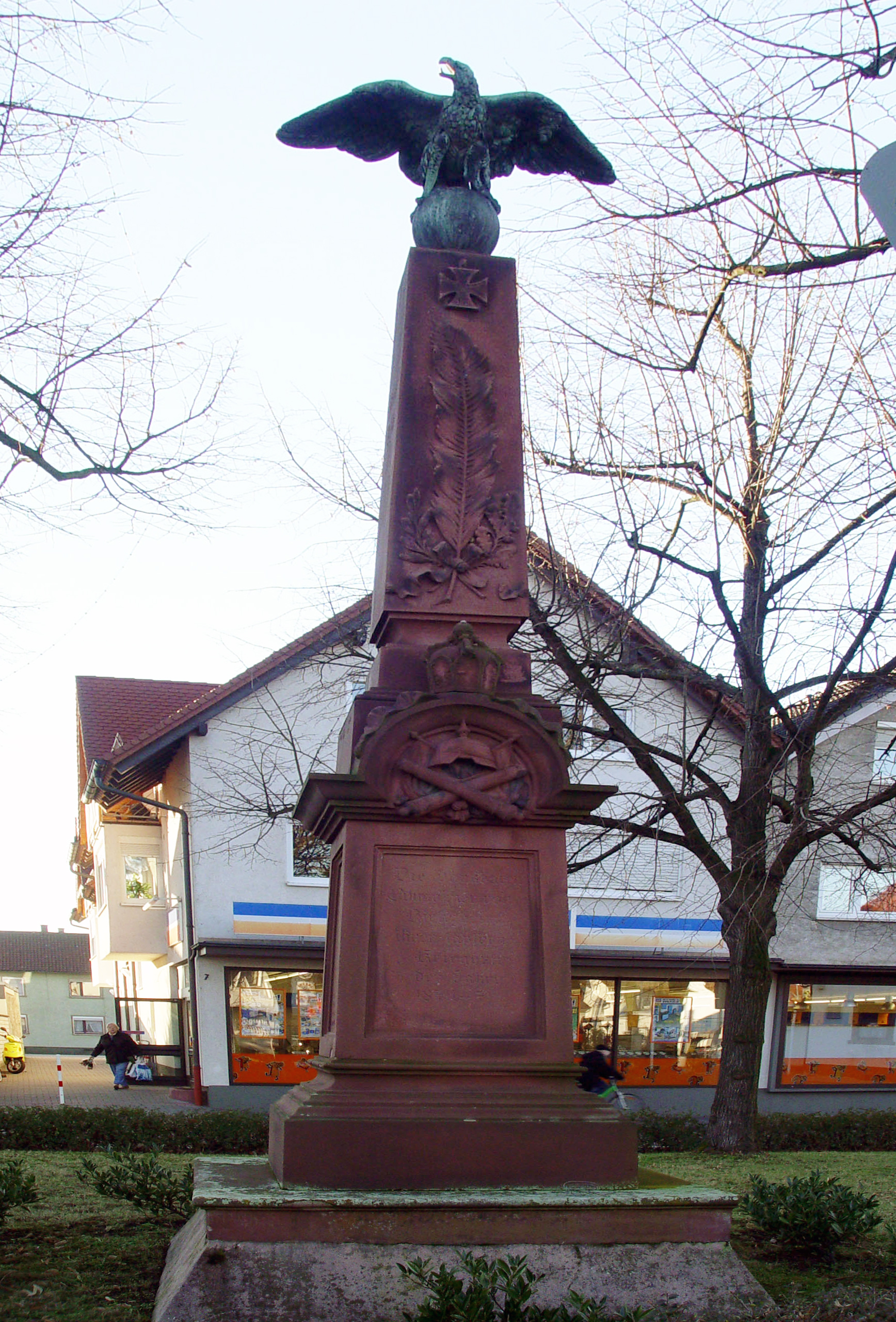 Das Kriegerdenkmal zum Gedenken an die Gefallenen des Krieges 1870/71 im badischen Bietigheim, stand ehemals auf dem Platz Blu, heute ist es abgebaut und einem Parkplatz gewichen. Schade, denn gerade in Friedenszeiten, sollte man den Gefallenen des Krieges gedenken, damit der Schrecken nicht in Vergessenheit gerät.